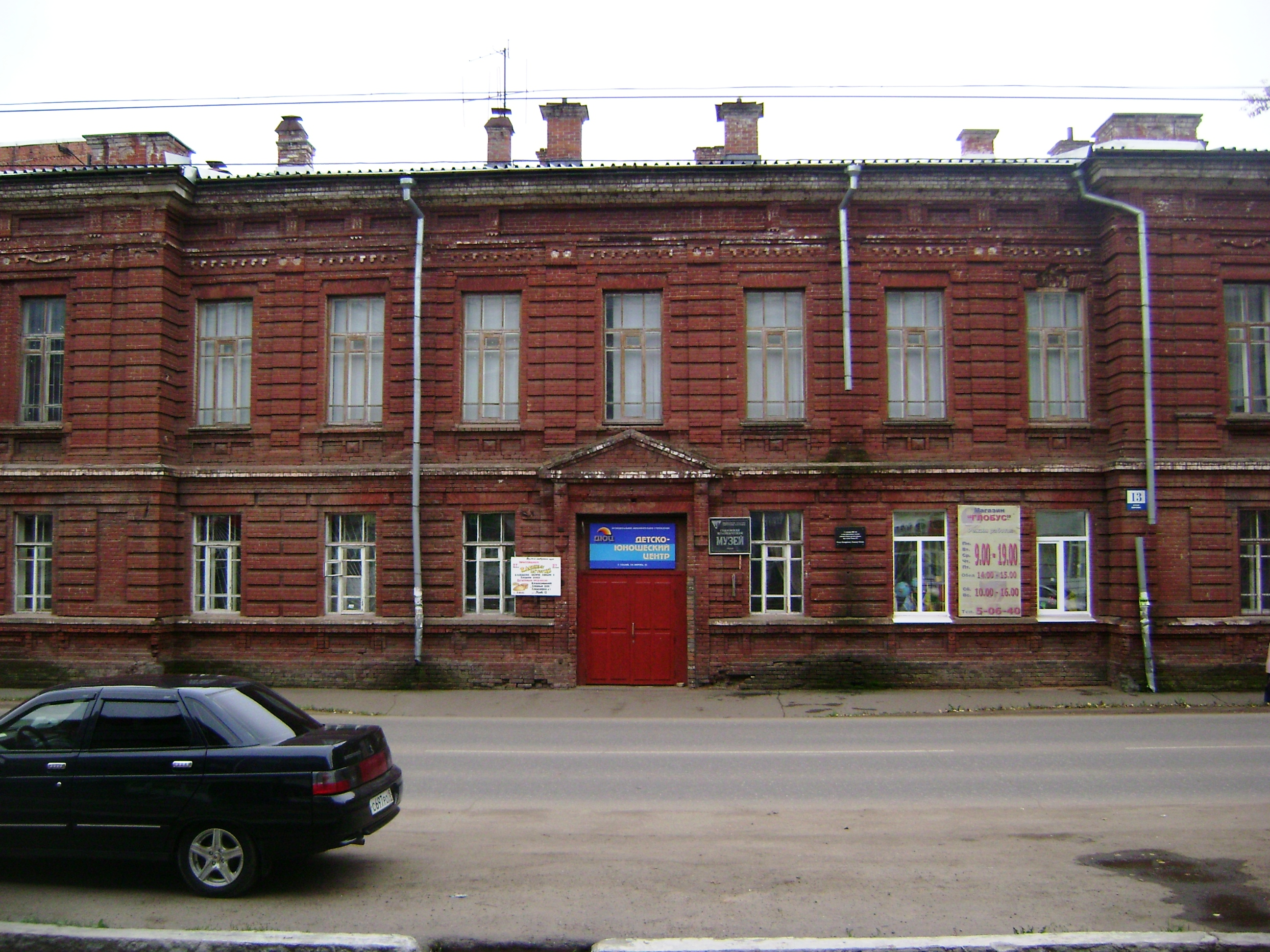 Здание бывшей женской гимназии в городе Глазове (поздний классицизм, 1897-1899). Ныне размещаются ДЮЦ и краеведческий музей